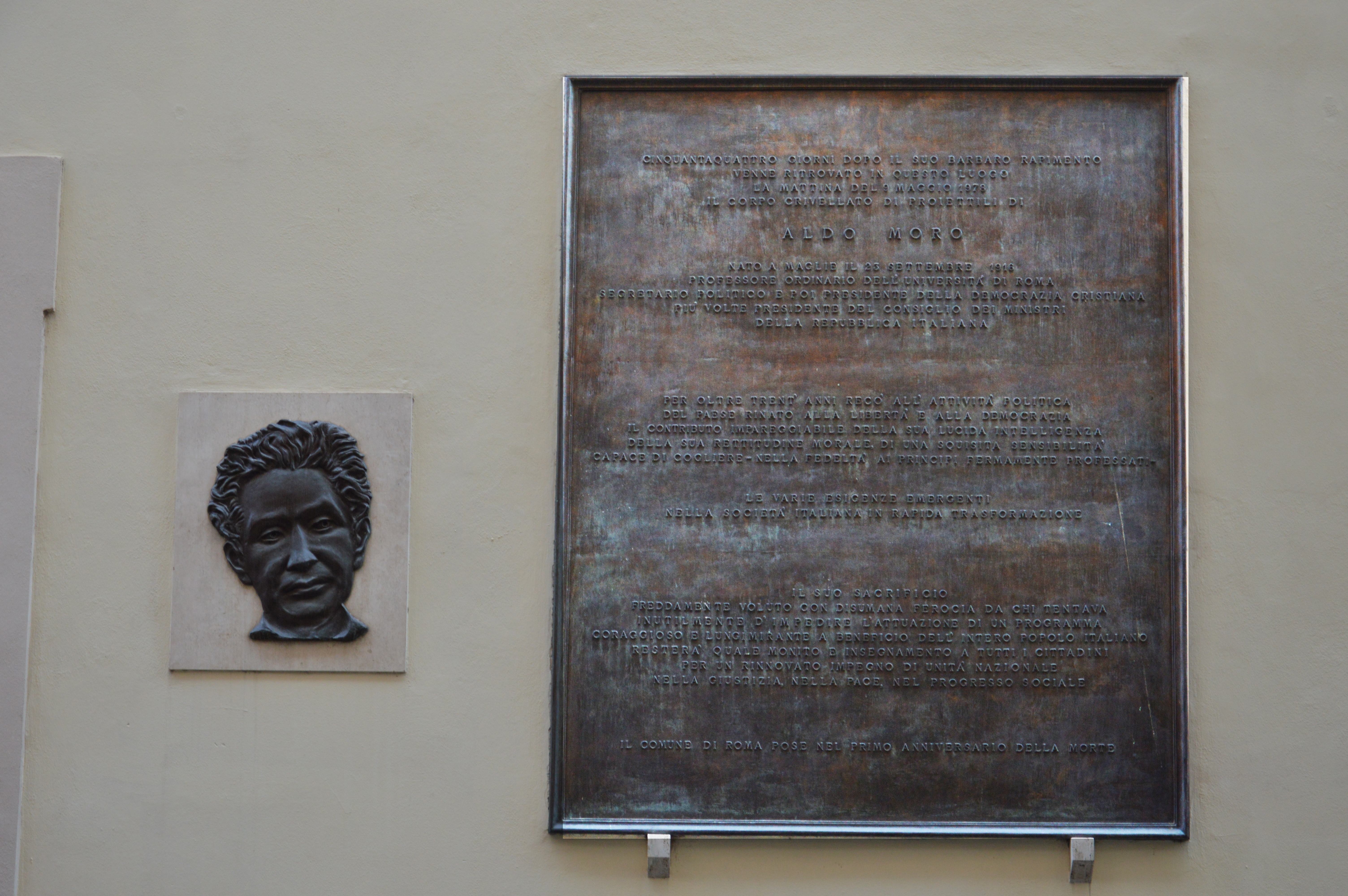 Gedenktafel Entführung und Ermordung Aldo Moro, Via Michelangelo Caetani, Rom.